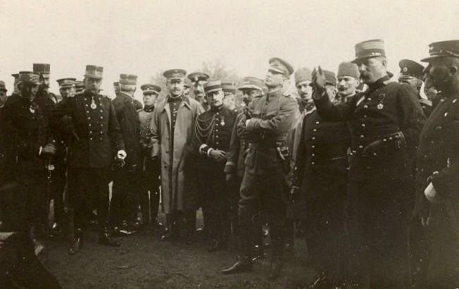 Osmanlı Devleti'nin Binbaşı Selahaddin Bey ve Mustafa Kemal'i gözlemci olarak gönderdiği, Fransa'da yapılan tatbikattan bir görüntü